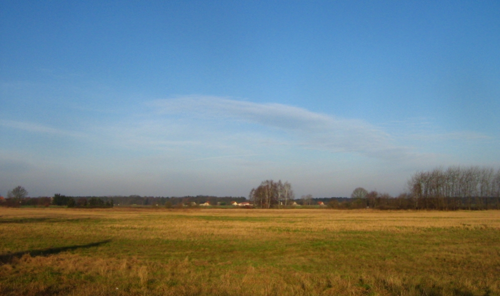 Luchgebiet innerhalb des Ländchens Glien, bzw. zwischen dem eigentlichen Glien und dem Kremmener Forst. Bei Amalienhof (Stadt Kremmen). Landkreis Oberhavel, Brandenburg.